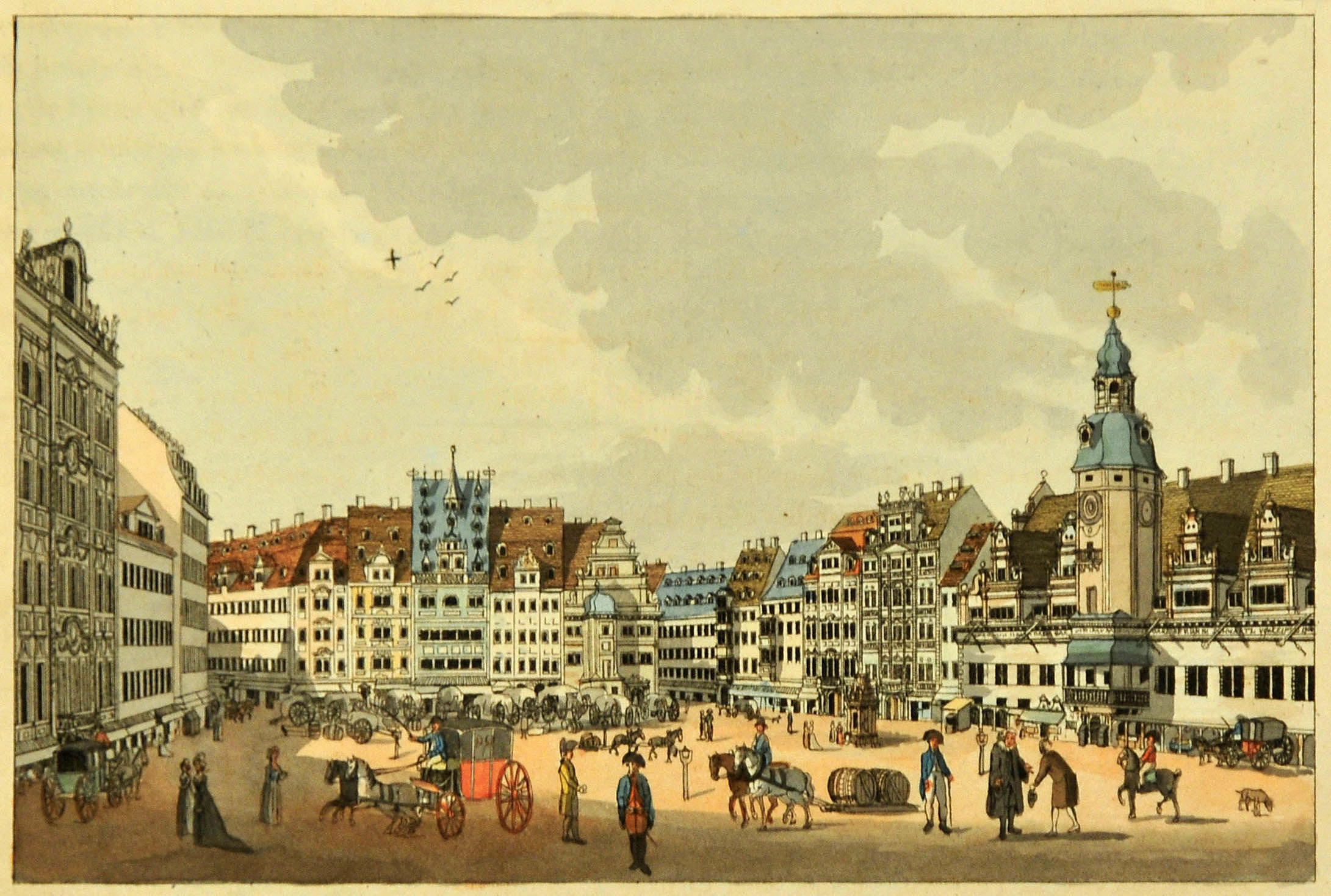 Leipzig 1804: Der Markt aus der Petersstrasse Aquarellierte Radierung 15,5 x 21 cm (Plattenrand) aus: Schwarz, Karl Benjamin: Romantische Gemählde von Leipzig. Eine Folge von vier und zwanzig Prospecten gezeichnet und gestochen von Karl Benjamin Schwarz. Leipzig: Karl Tauchnitz 1804, 56 S. + 23 aquarellierte Kupfertafeln + 1 nicht kolorierte Radierung. Carl Benjamin Schwarz: Vedutenstecher, Zeichner, Radierer, Farbstecher und Aquarellist (*1757 Leipzig, † 21.10.1813 ebenda). Schüler Oesers; Kustos an der Winklerschen Kunstsammlung (THIEME-BECKER Bd. XXX, S.365).